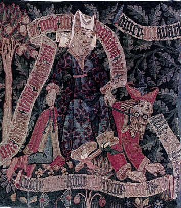 Ausschnitt aus einem Basler Wirkteppich der 1470er Jahre. Gezeigt wird der Philosoph Aristoteles, der verliebt und mit einer Narrenkappe versehen, der Phyllis als Reittier dient. Das Motiv entstammt humanistischem Bildungsgut, das moralisierende Themen aus der Antike aufgriff und hier in die ansonsten von Wildleuten und Minnesang dominierten Szenarien spätmittelalterlicher Wirkteppiche Eingang fand.